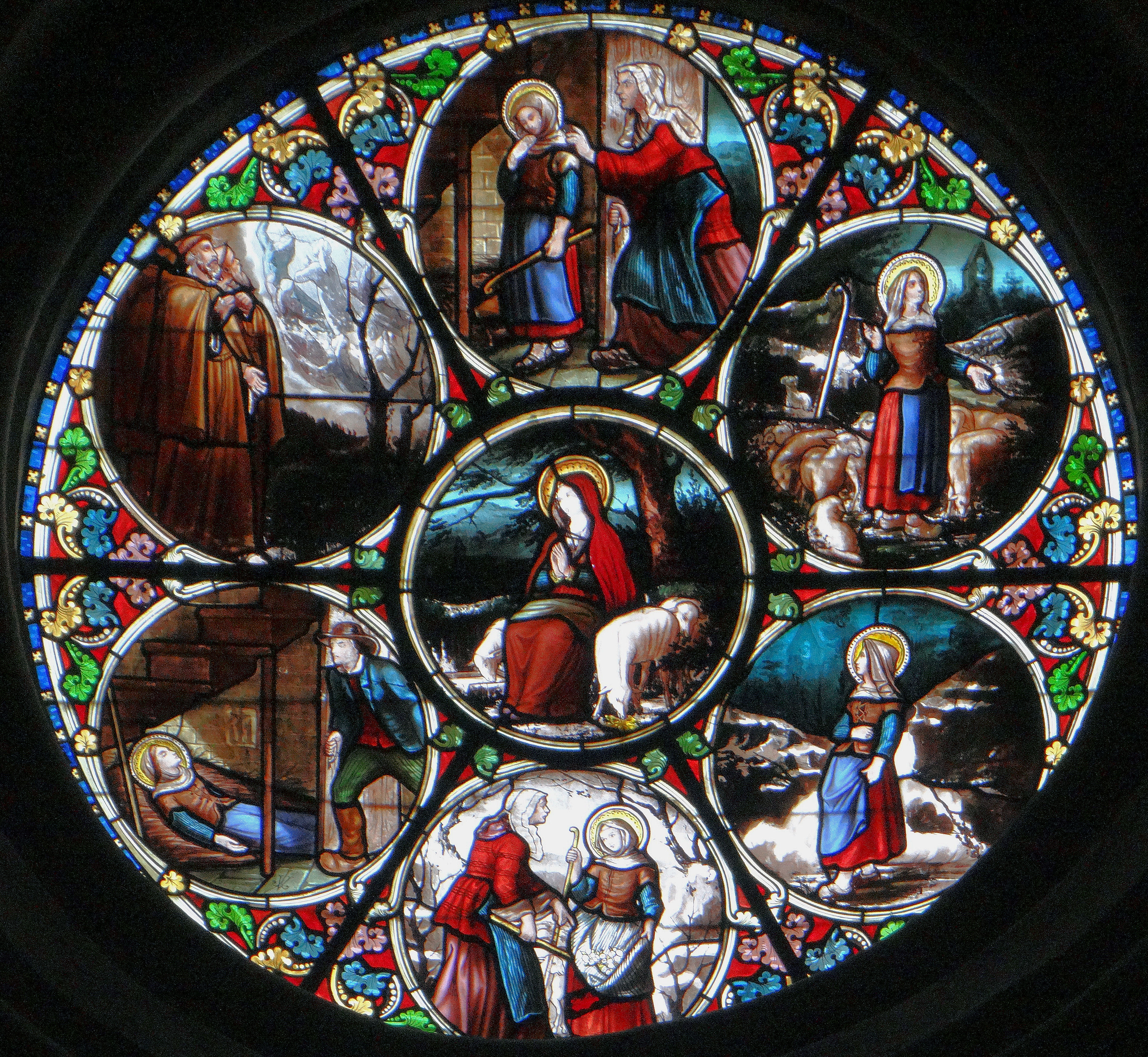 Castelsarrasin - Église Saint-Sauveur - Vitrail du transept sud